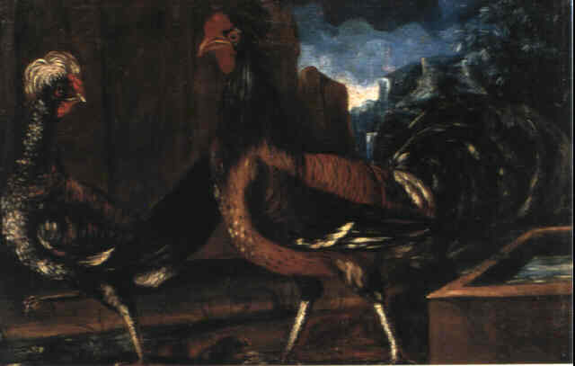 Magnus Stenbock: Hühner Öl auf Leinwand, 56 x 85 cm 1700 - 1709